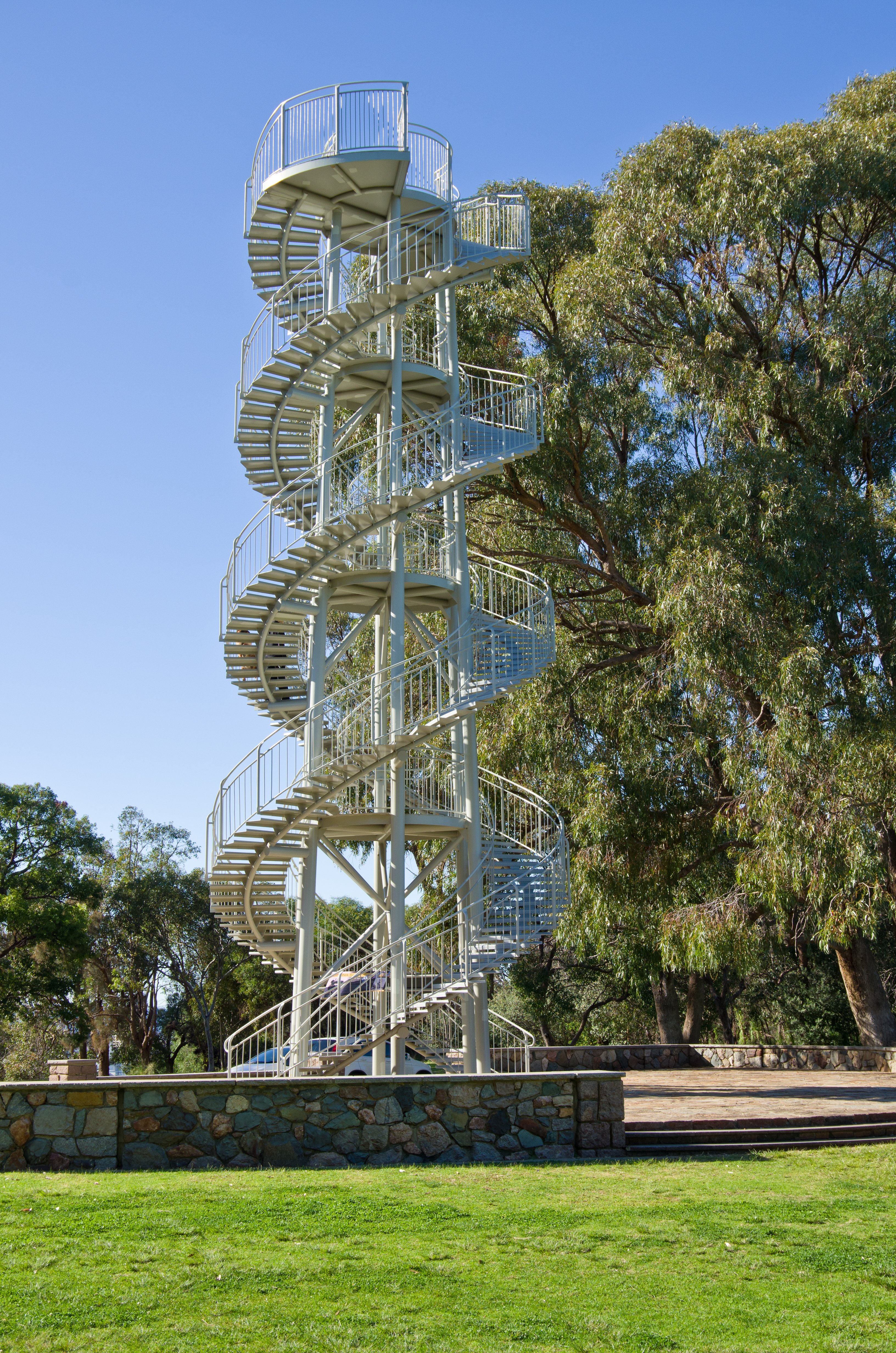 Kings Park, Western Australia DNA Tower